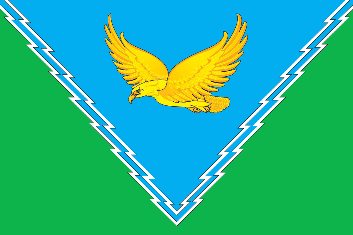 Флаг Апшеронского района Краснодарского края, Россия.